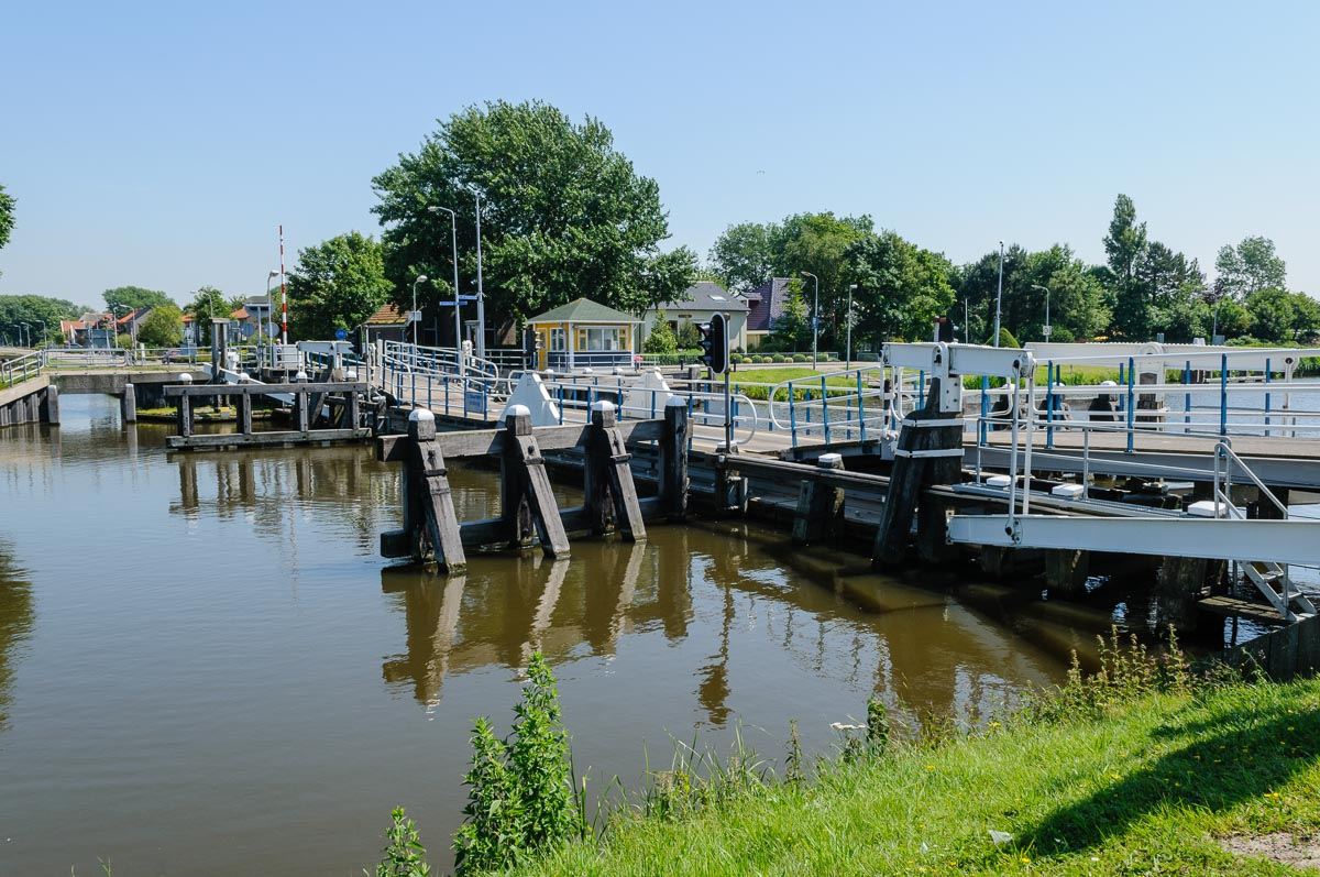 De vlotbrug in het Noord Hollandskanaal, Sint Maartensvlotbrug, gemeente Schagen, Noord Holland, Nederland